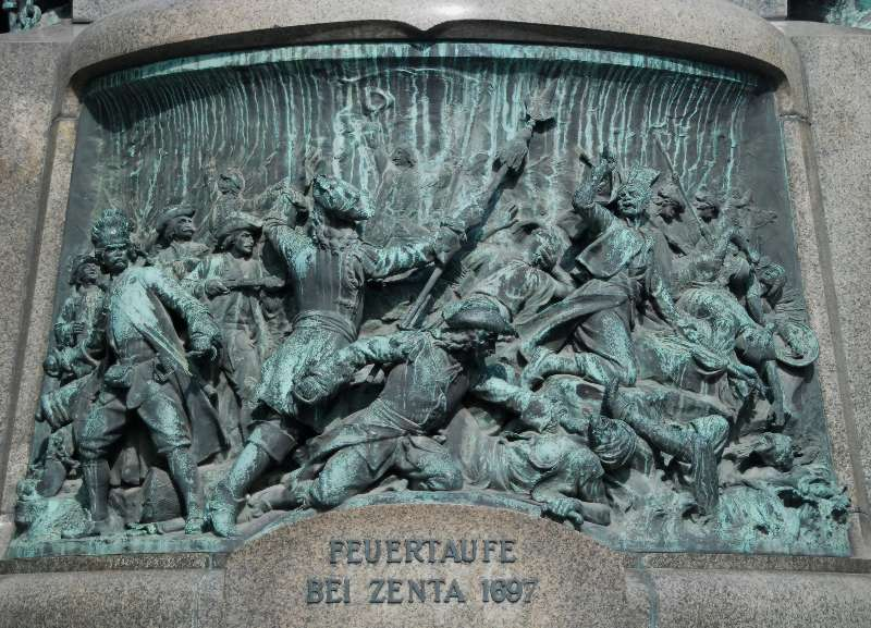 Das Zenta-Relief auf dem Deutschmeister-Denkmal an der Wiener Ringstraße